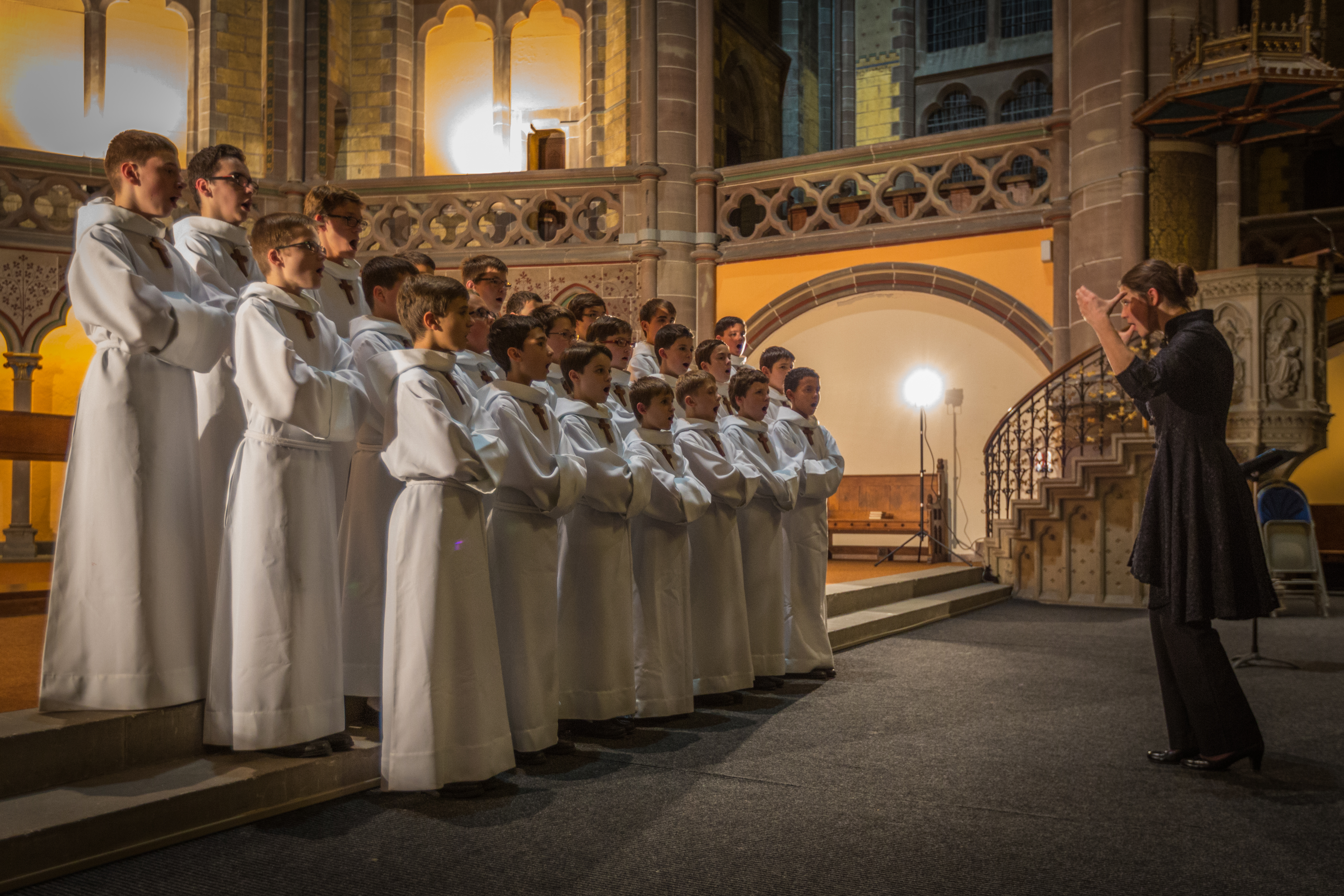 La Manécanterie des Petits Chanteurs à la Croix de Bois en concert à l’église Saint-Paul de Strasbourg pour un concert organisé par la l’Ordre international des Anysetiers, chapitre de Strasbourg, au profit de l’association Semeurs d’Étoiles' le 9 novembre 2013.